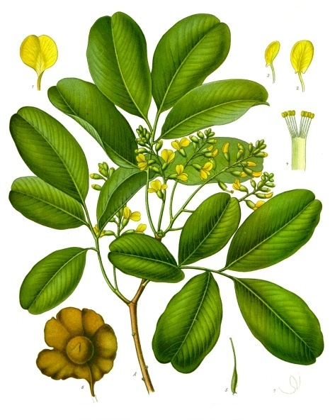 Malabarkino. A blühender Zweig, natürl. Grösse; 1, 2, 3 Theile der Krone, vergrössert; 4 Staubgefässe, desgl.; 5 Stempel, desgl.; 6 Frucht, natürl. Grösse; 7 Schnittfläche der geflügelten Frucht, desgl.